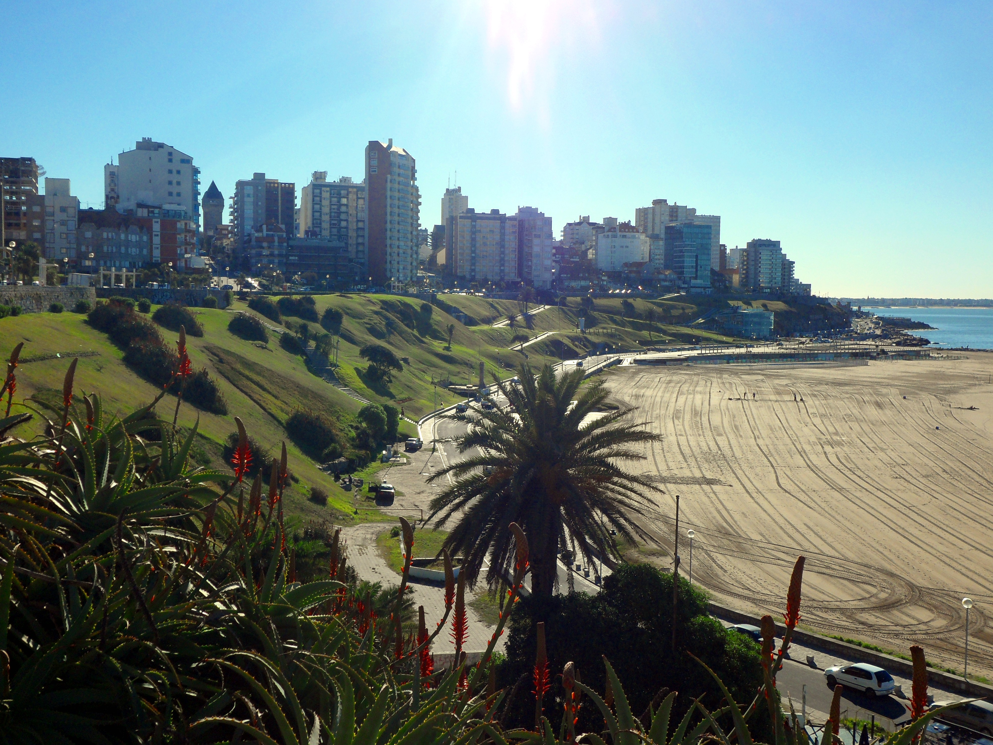 Panorámica varese